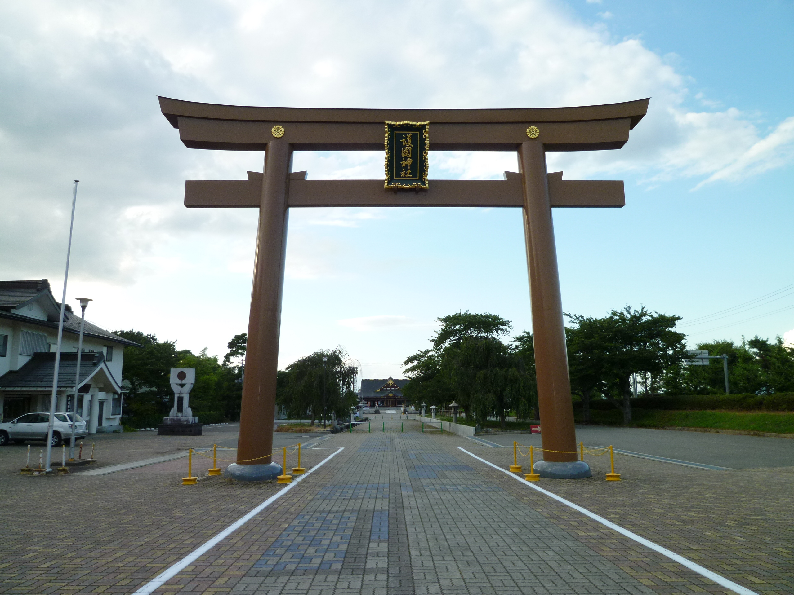 山形県護国神社遠景